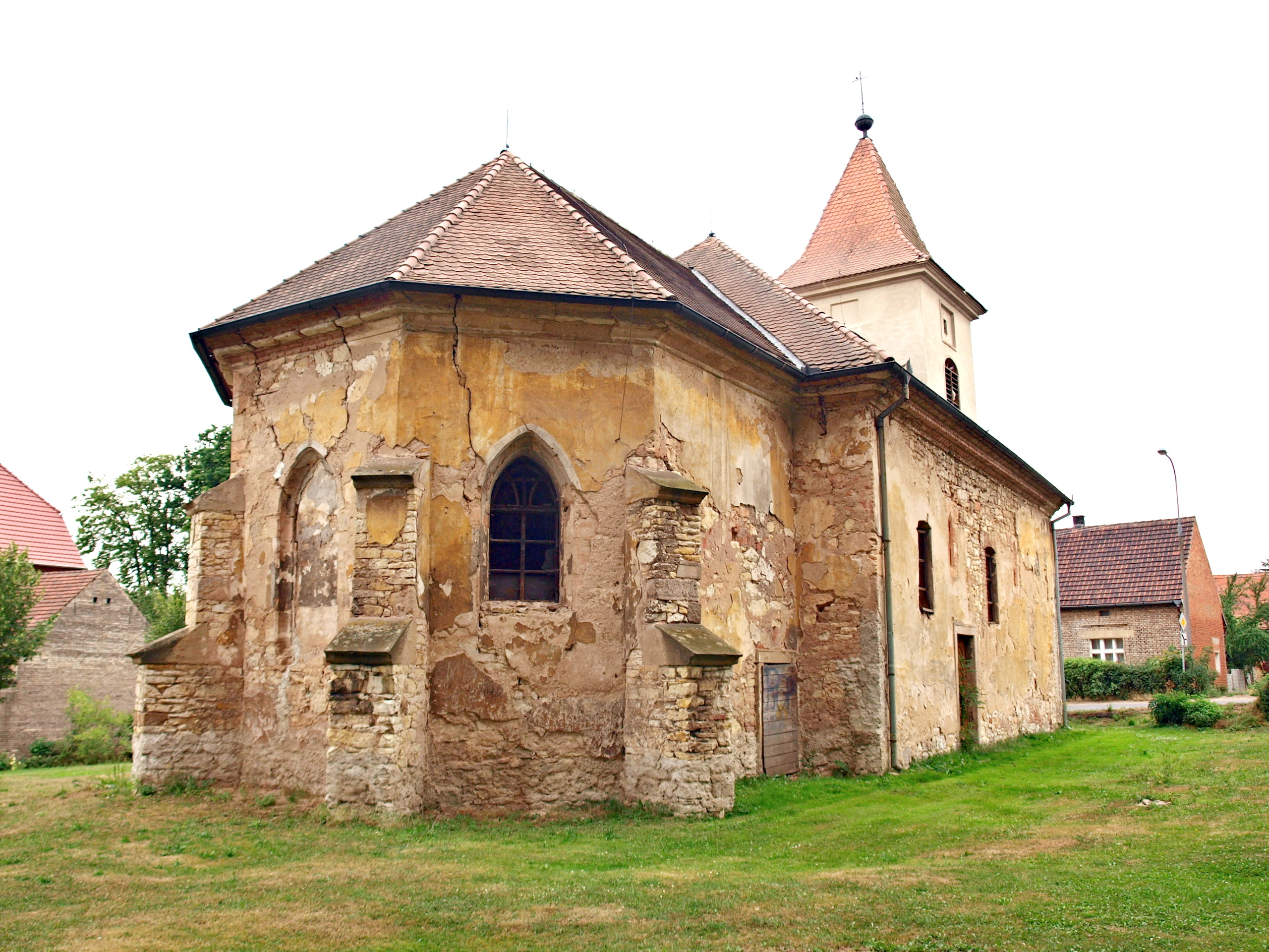 Nesuchyně